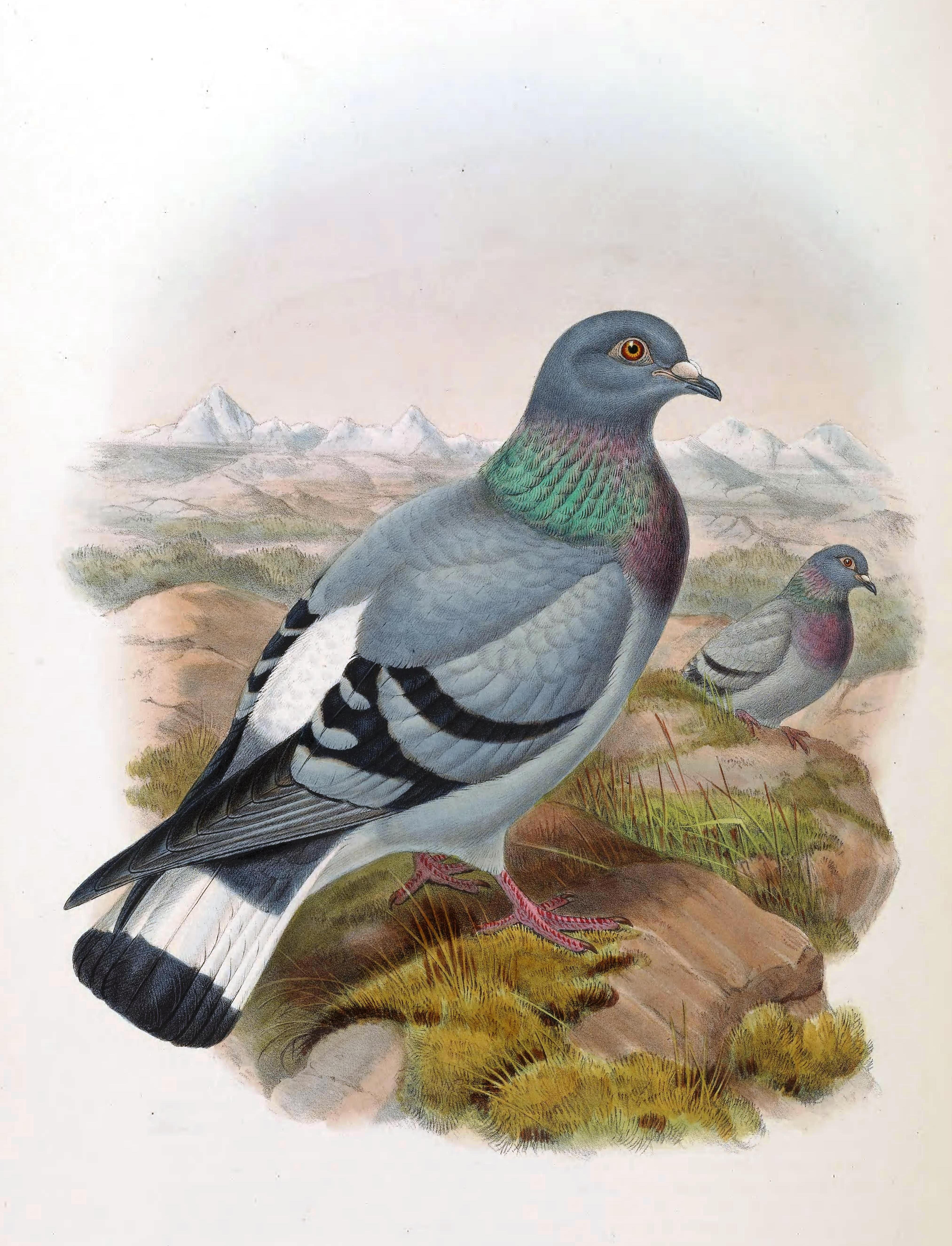 Скалистый голубь (Columba rupestris)